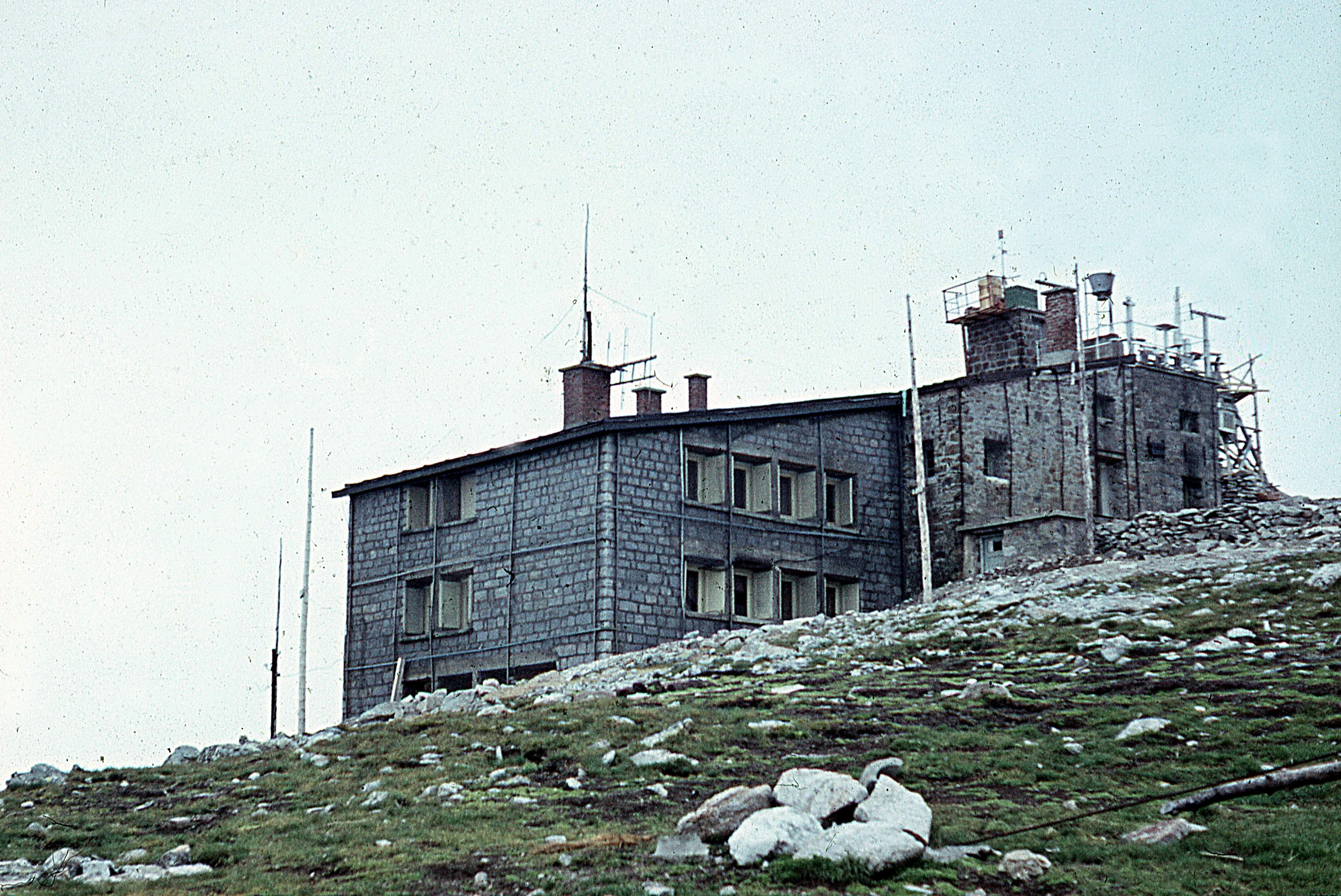 Bulgarien, Wetter- und kosmische Station auf dem Mussala